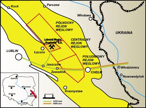 lokalizacja Lubelskiego Zagłębia Węglowego